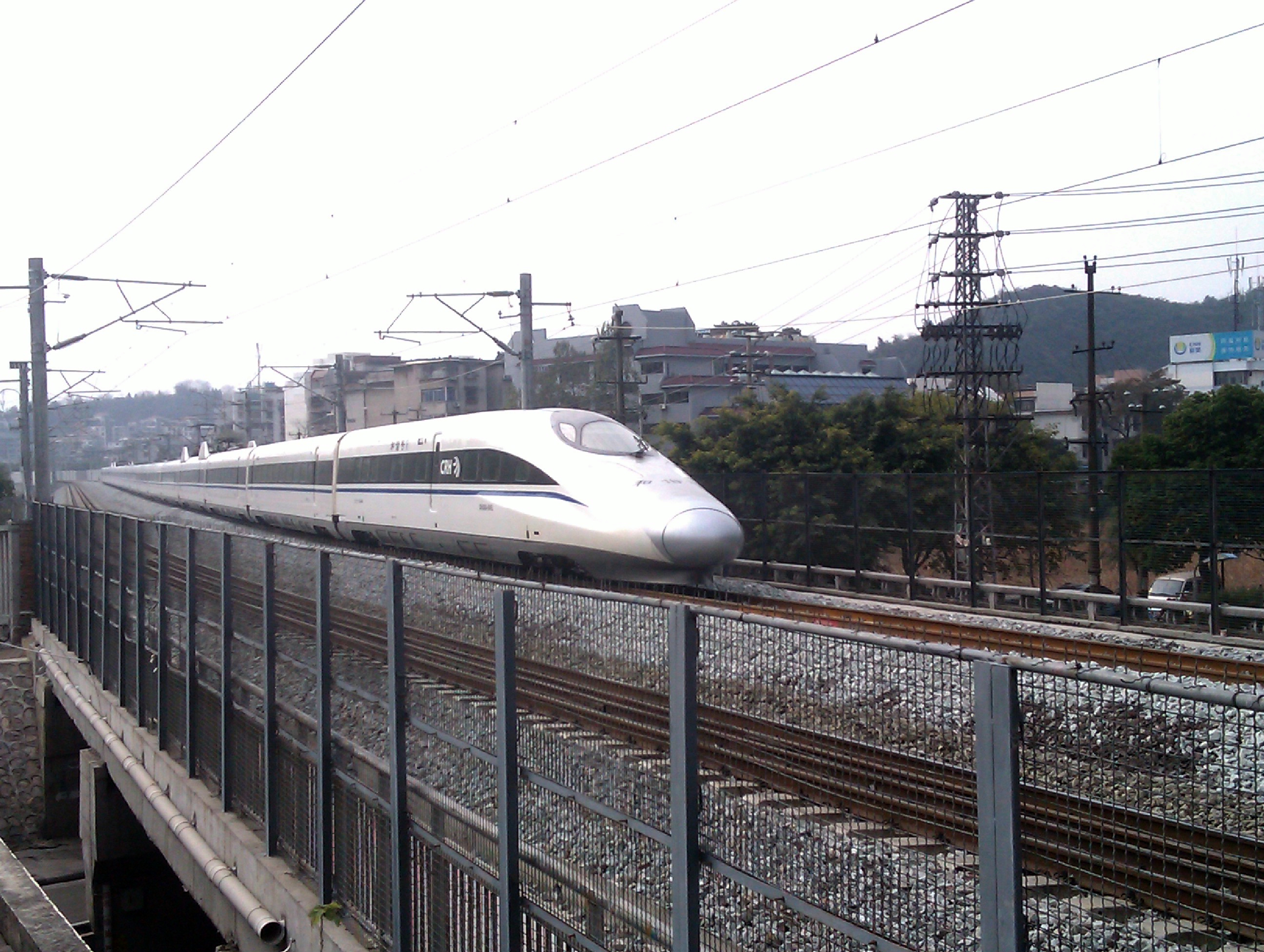 由桂林开往北京西的G530次列车通过桂林丽君路立交桥。